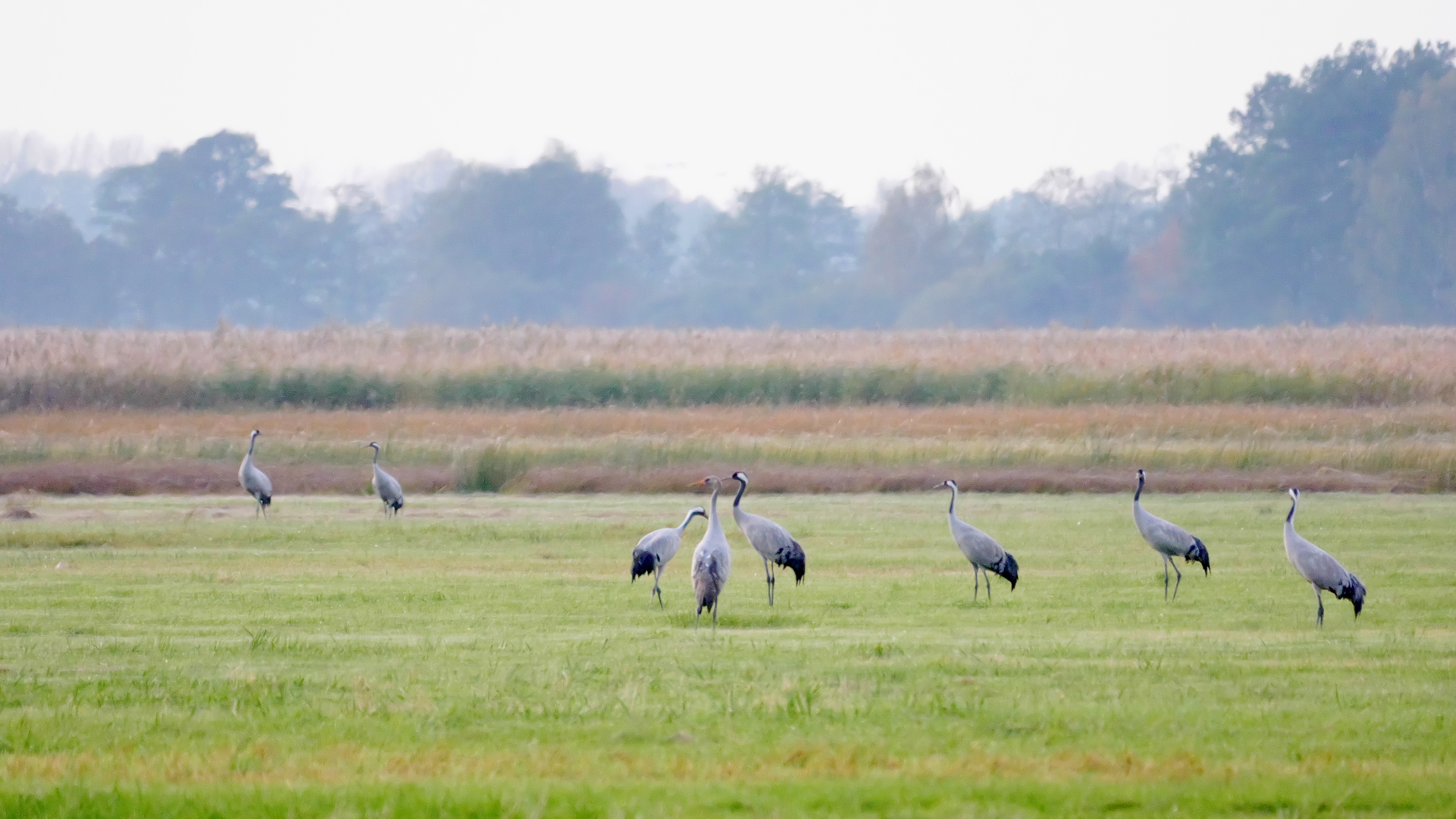 Kraniche am Moorsee im Streng zwischen Netzener See und Rietzer See im Naturschutzgebiet Rietzer See.